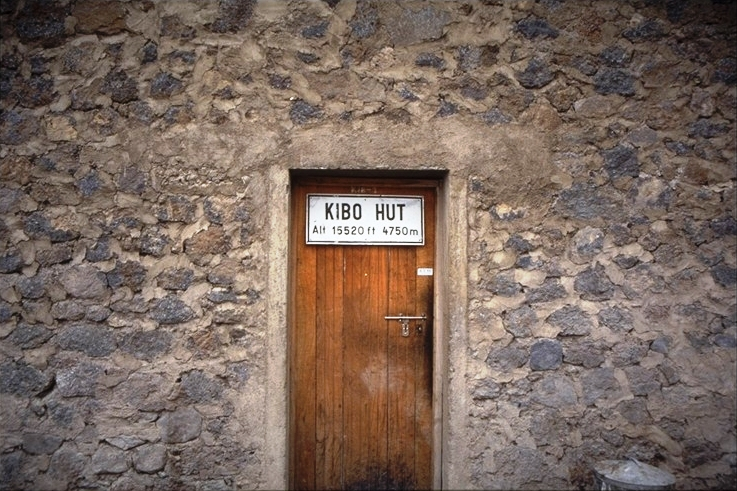 Kilimanjaro National Park - Tanzania